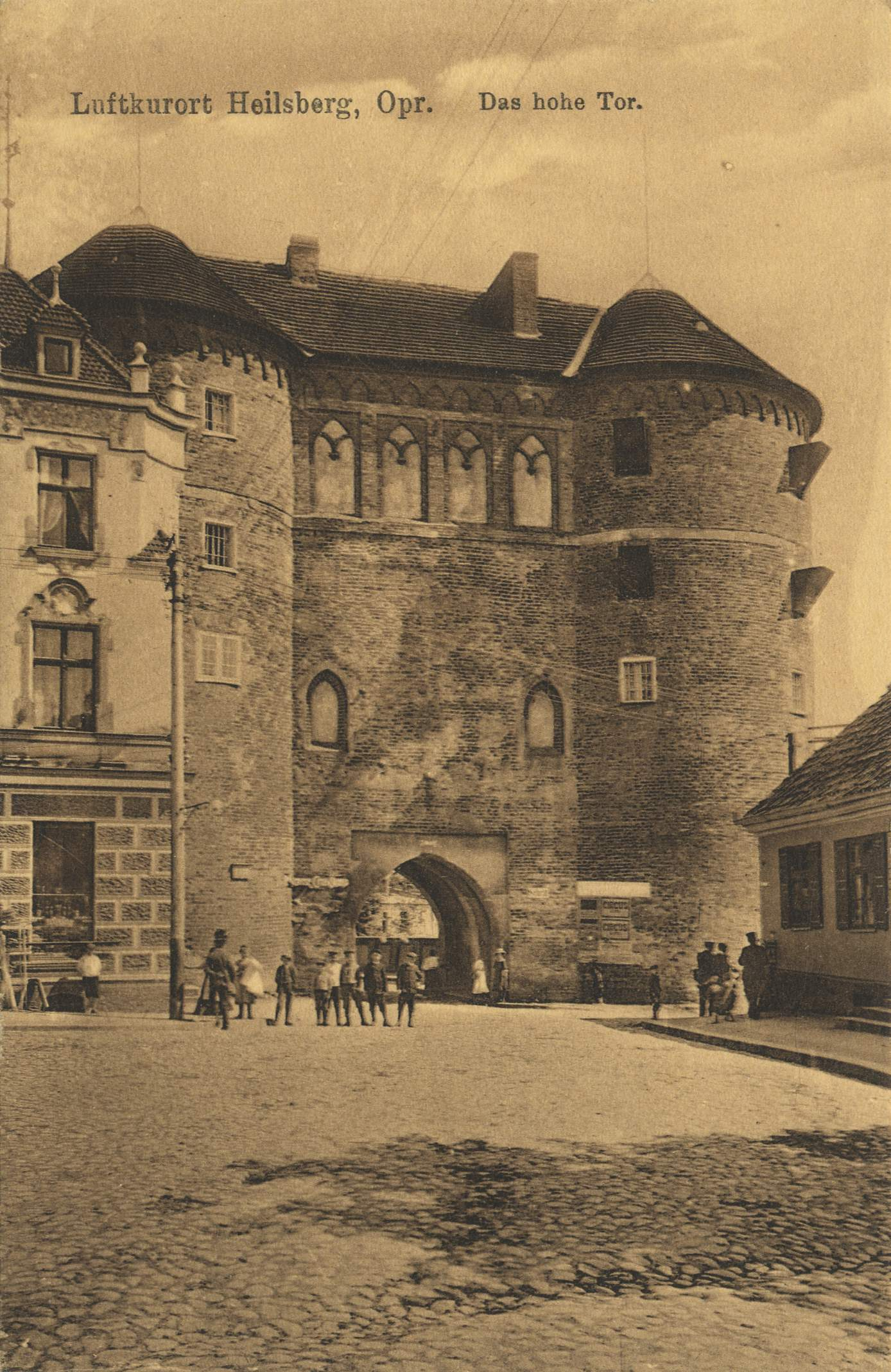 Hohes Tor